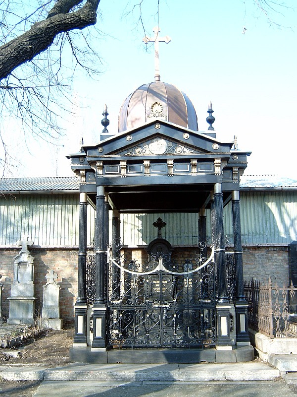 Gozsdu Emánuel sírja Budapesten. Kerepesi temető: B. 136. 1870 körül. (9-es parcella) This is a photo of a monument in Hungary. Identifier: 931